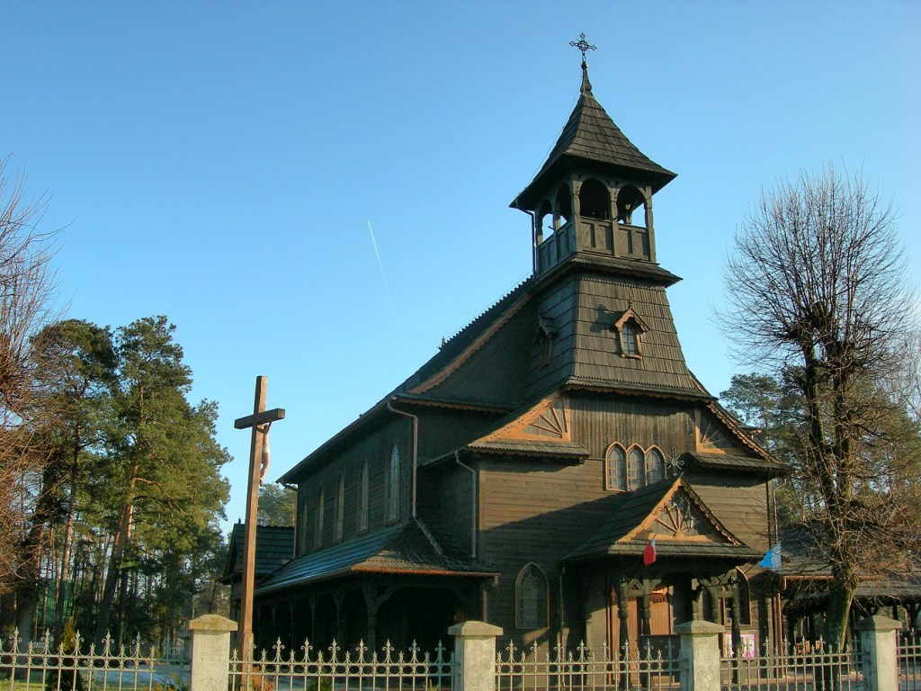 Kościół_w_Jedlni_Letnisko